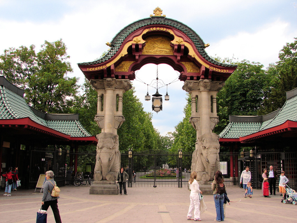 Eingang Elefantentor zum Zoologischen Garten Berlin